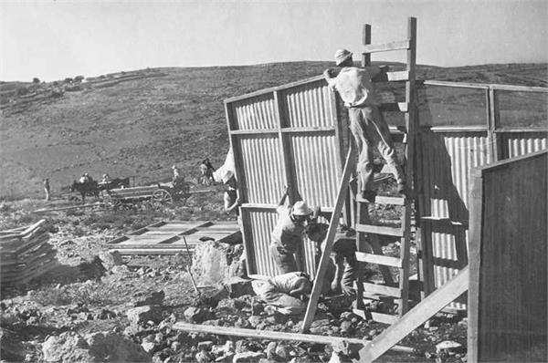 הקמת המחנה ביום העליה לעין-צורים בהרי חברון